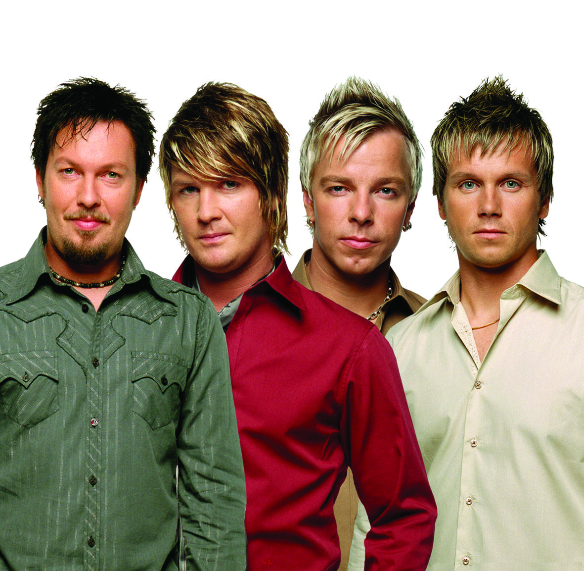 Dansbandet Arvingarna.